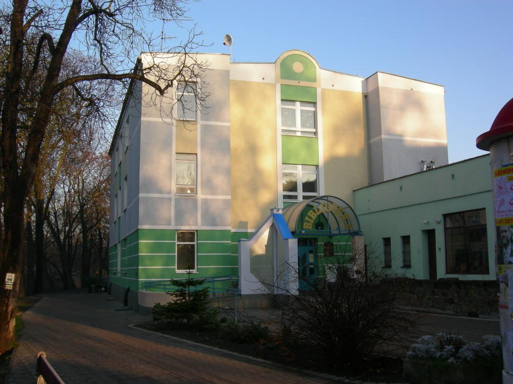 Synagoga w Kościanie /Synagogue de Kościan